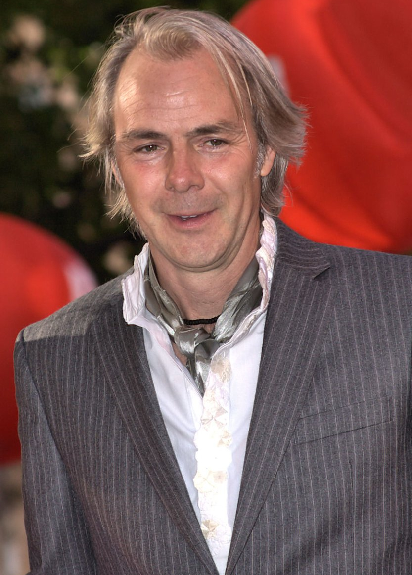 Harald Zwart, Karate Kid film premiere